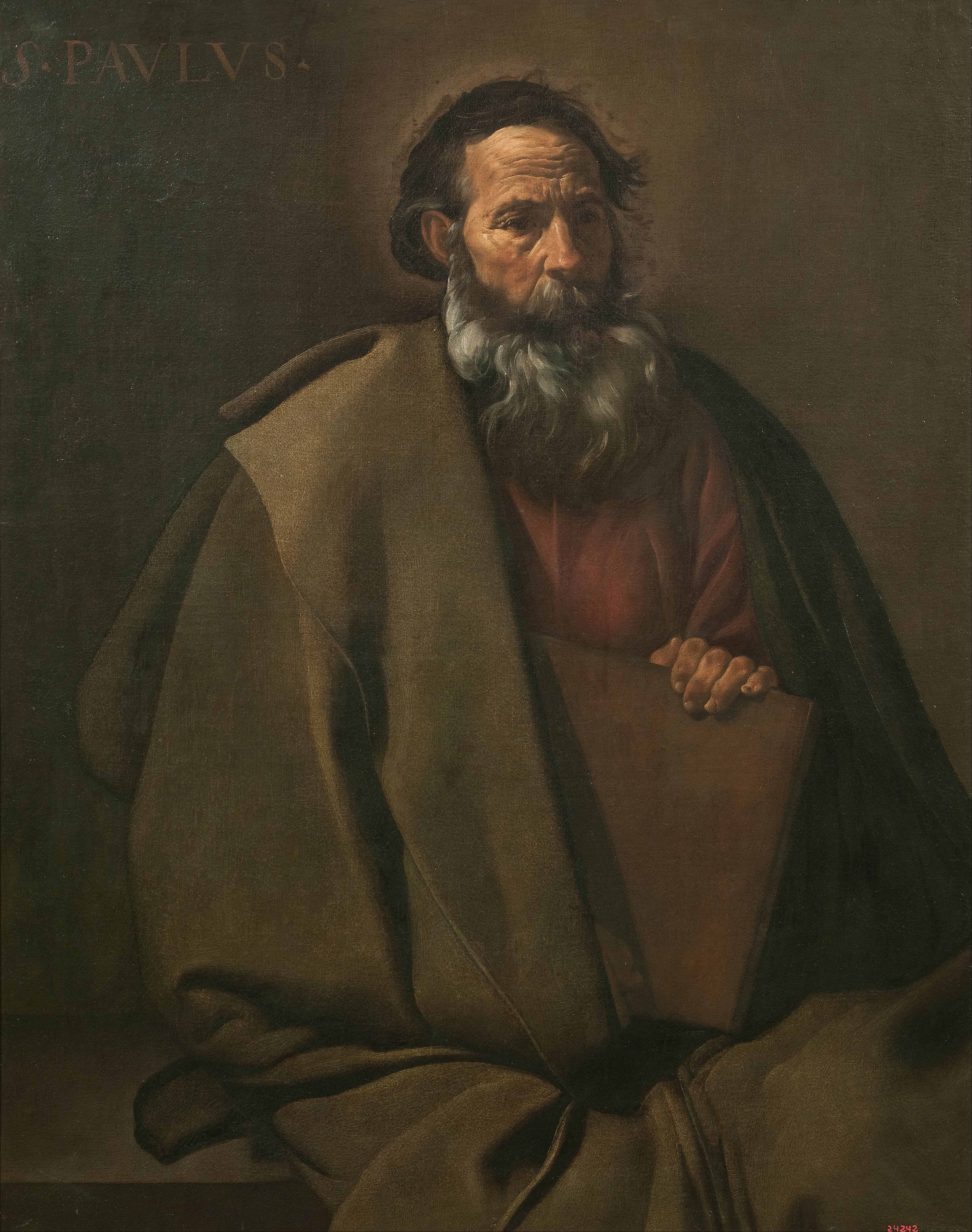 La obra representa al apóstol San Pablo, llamado el Apóstol de los Gentiles.